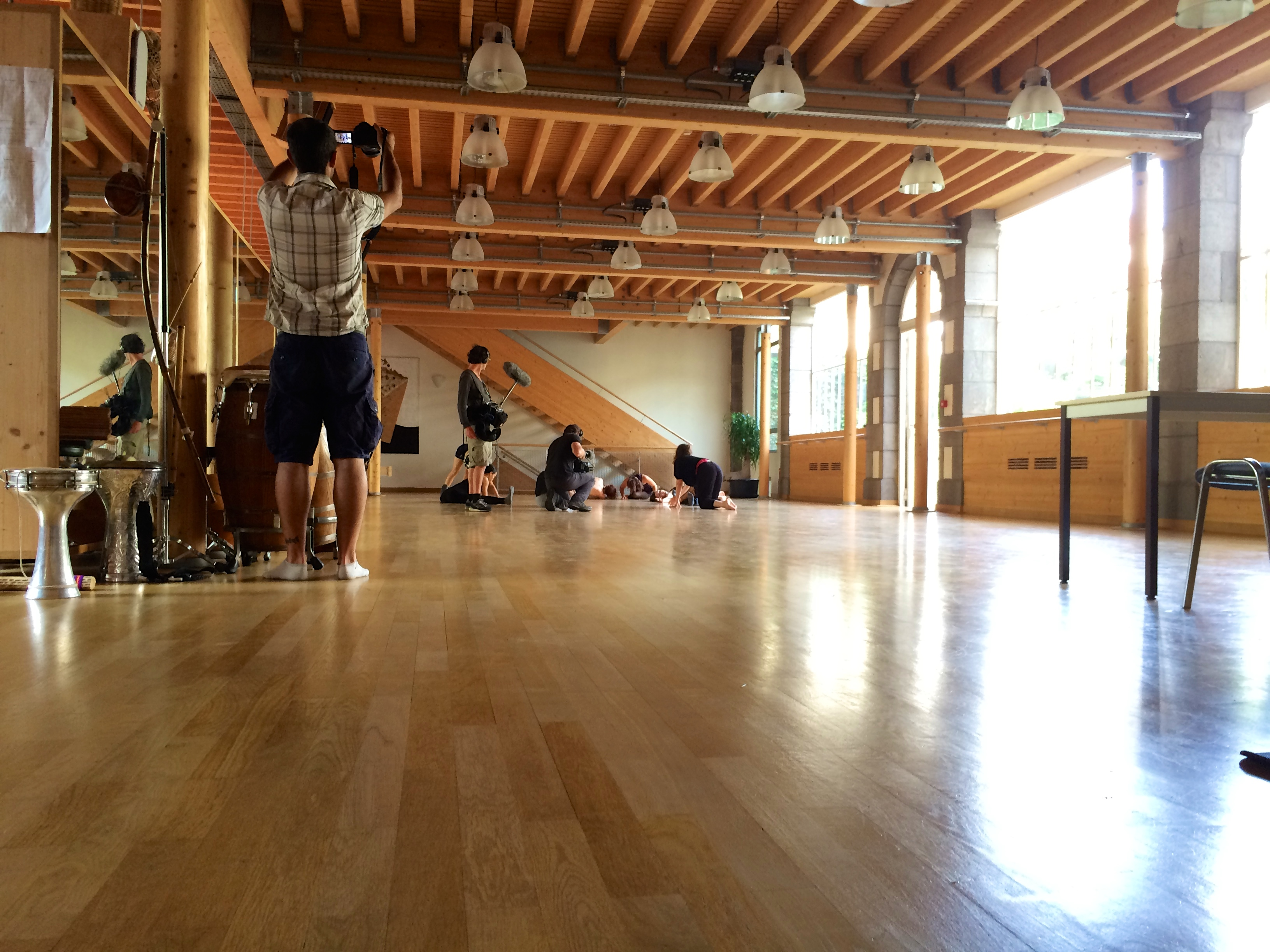 Tournage à La Manufacture d'Aurillac de l'émission "Echappées Belles" ldiffusée sur France 5.